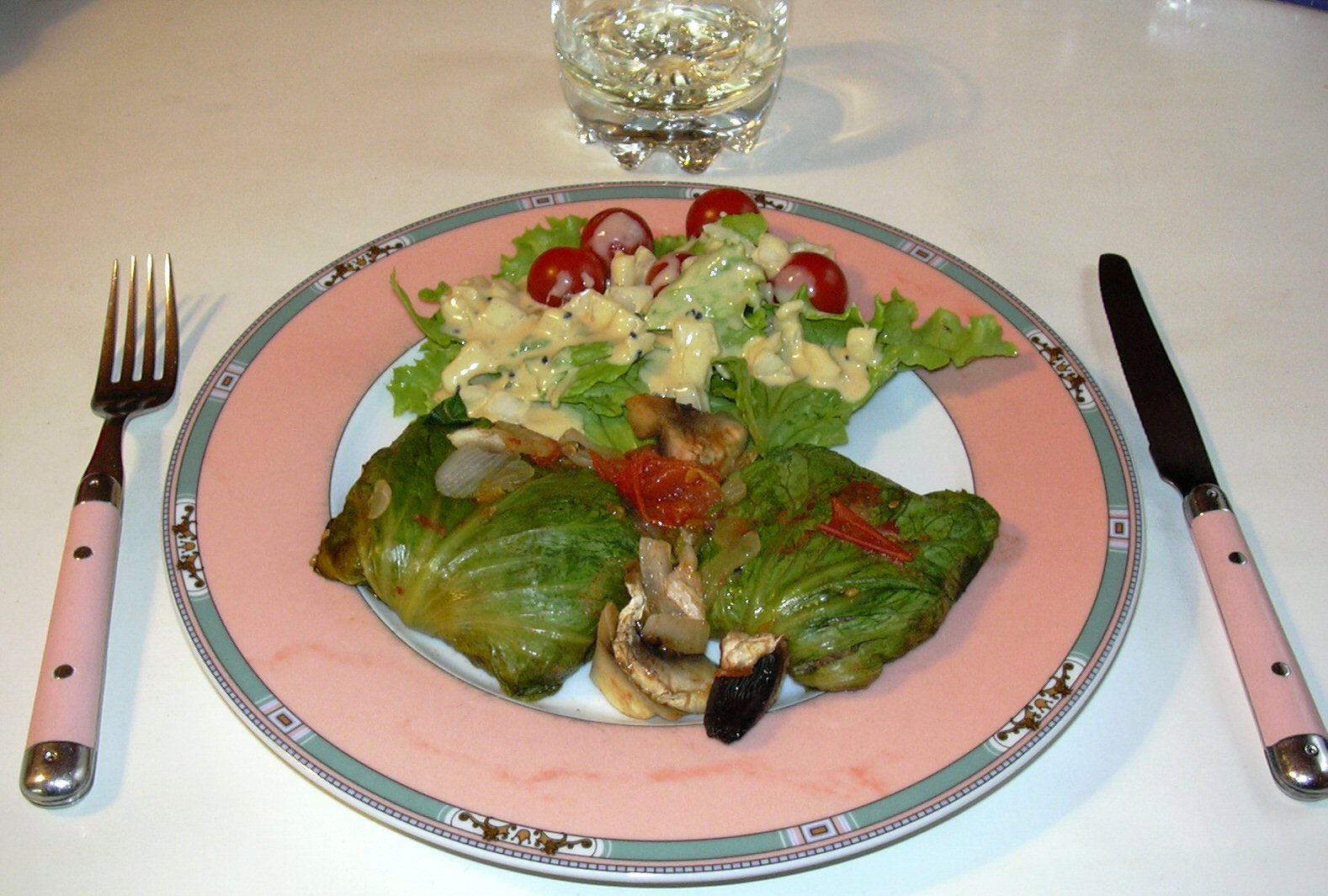 farci ADHOC